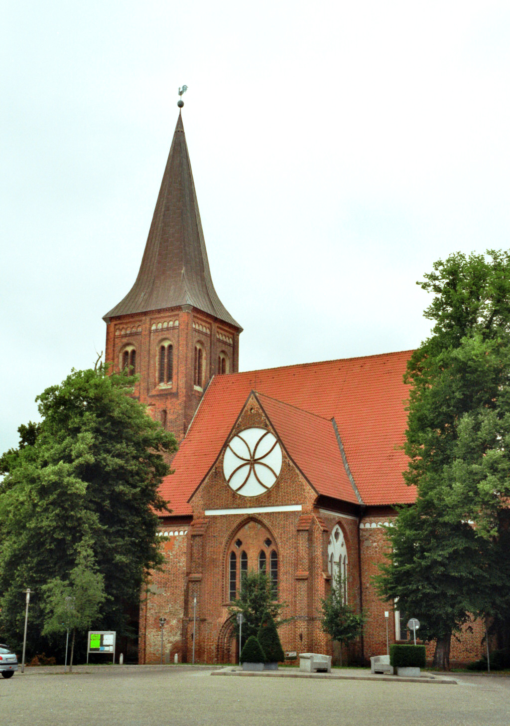 Die Bartholomäus - Kirche in Wittenburg. Selbst aufgenommen '05.